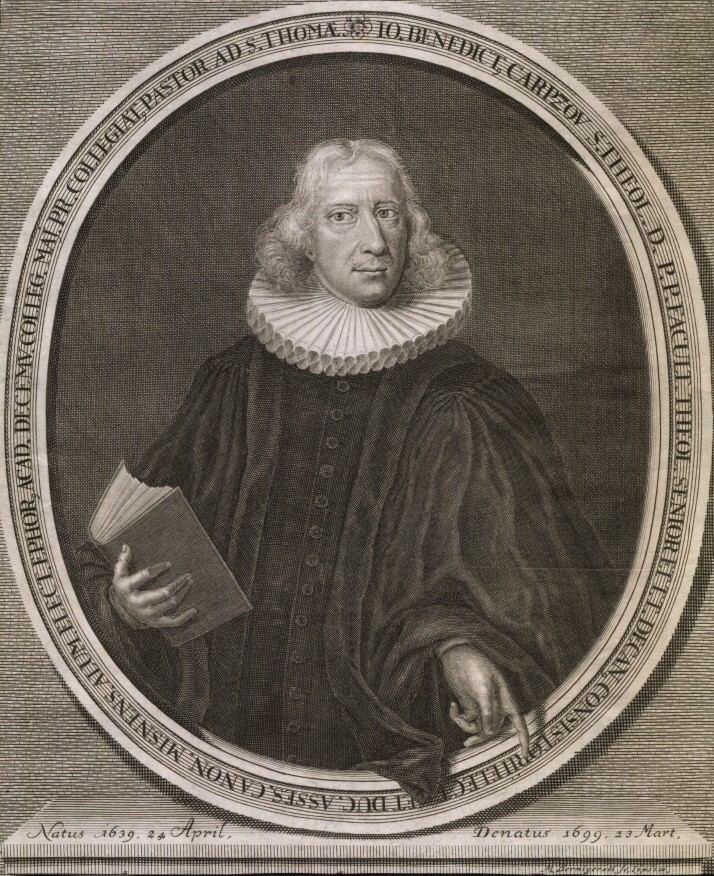 Johann Benedict Carpzov II auf einem Stich von Martin Bernigeroth